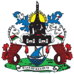 Emblème de la cité de Mombasa